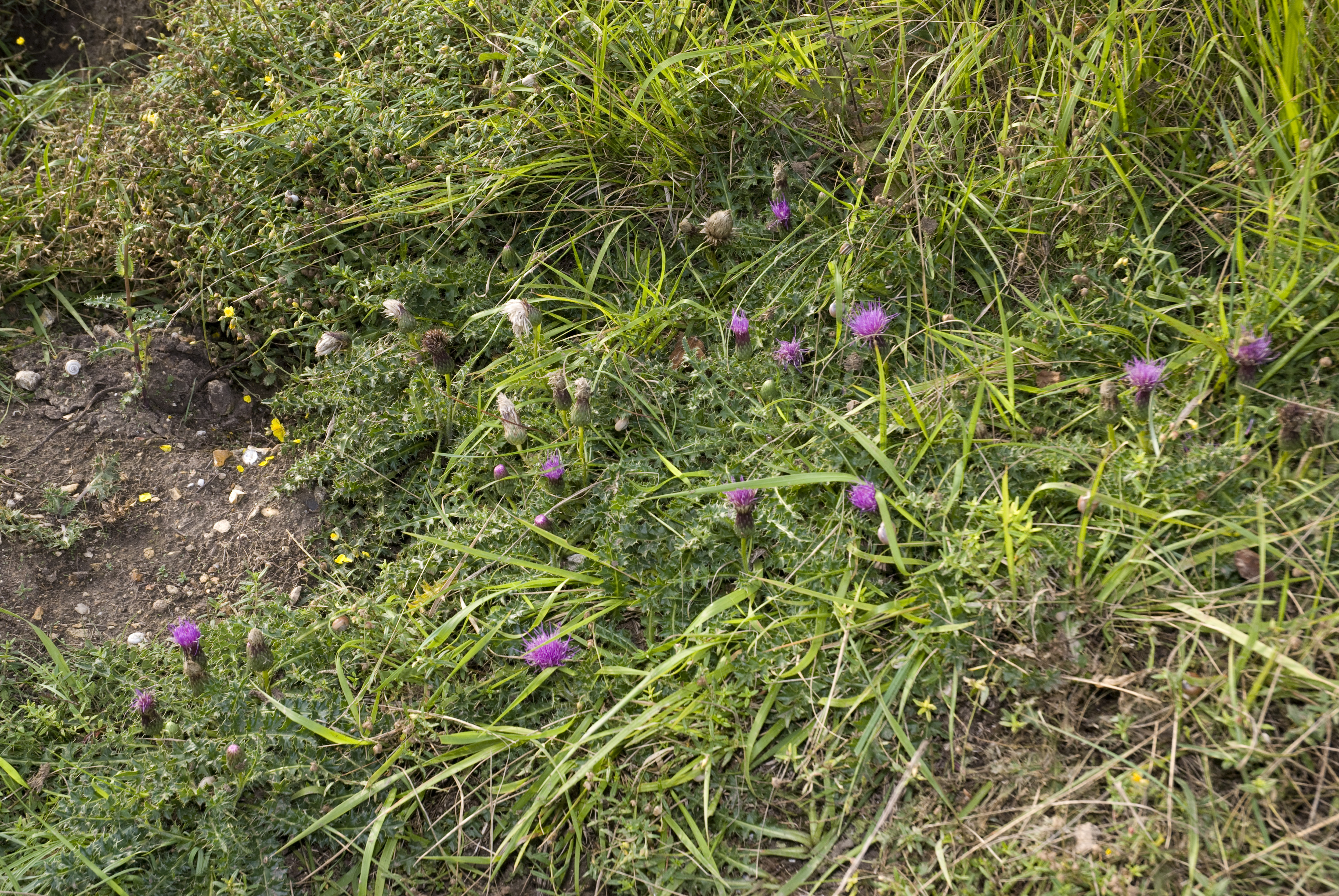 Cirsium acaule Vallée de Grâce à Amiens (Somme), France